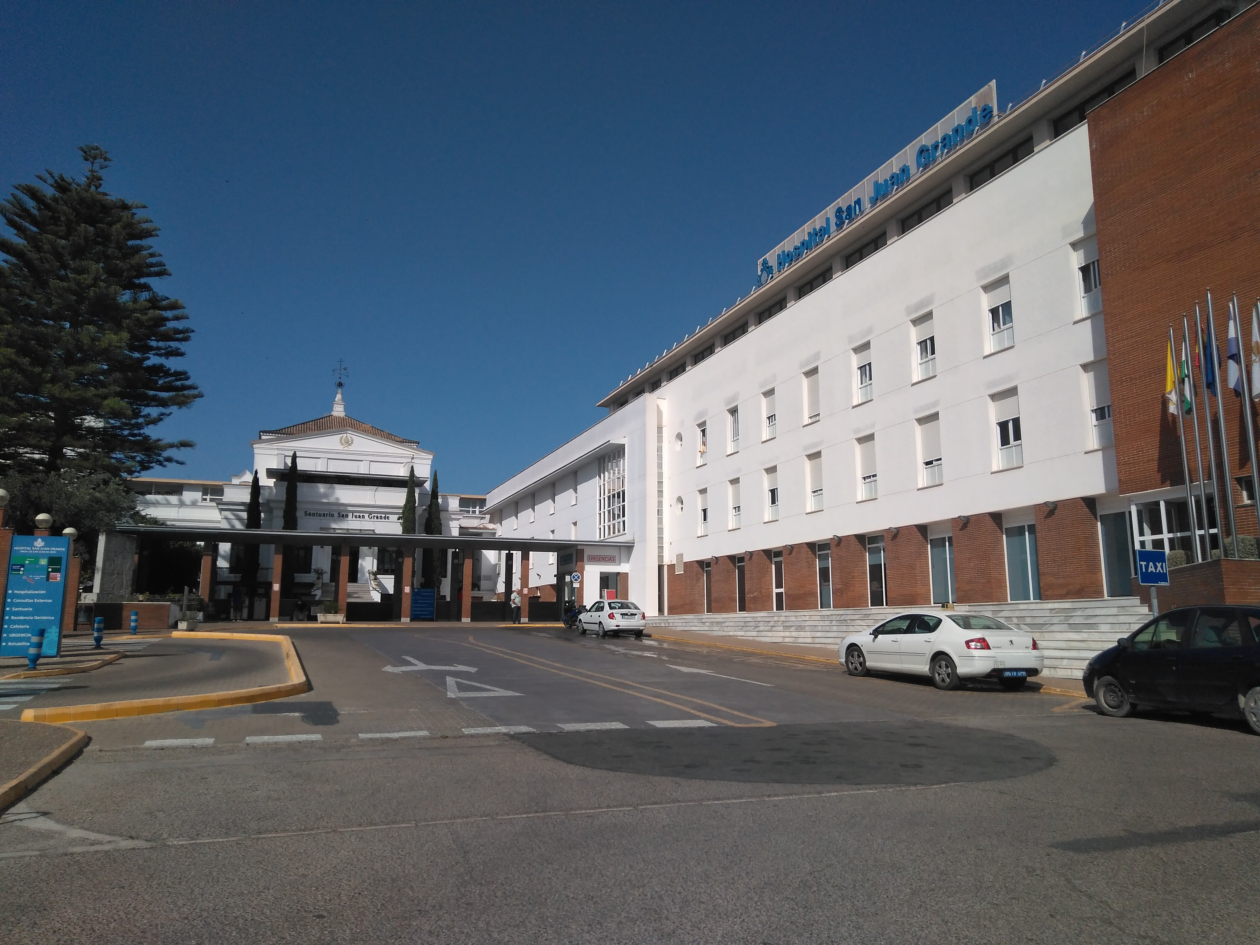 Hospital Juan Grande - Jerez de la Frontera (España)